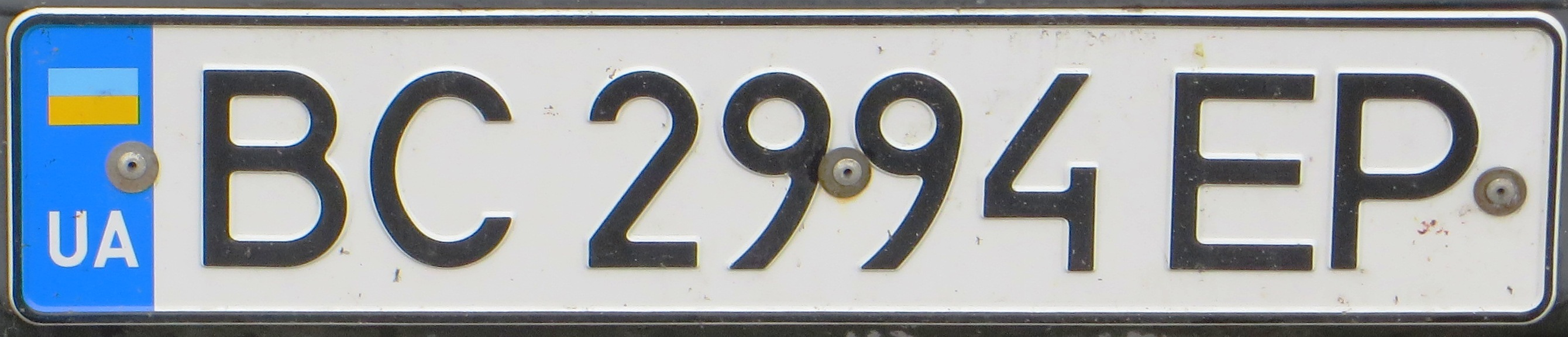 nieuwe kenteken plaat van Oekraine